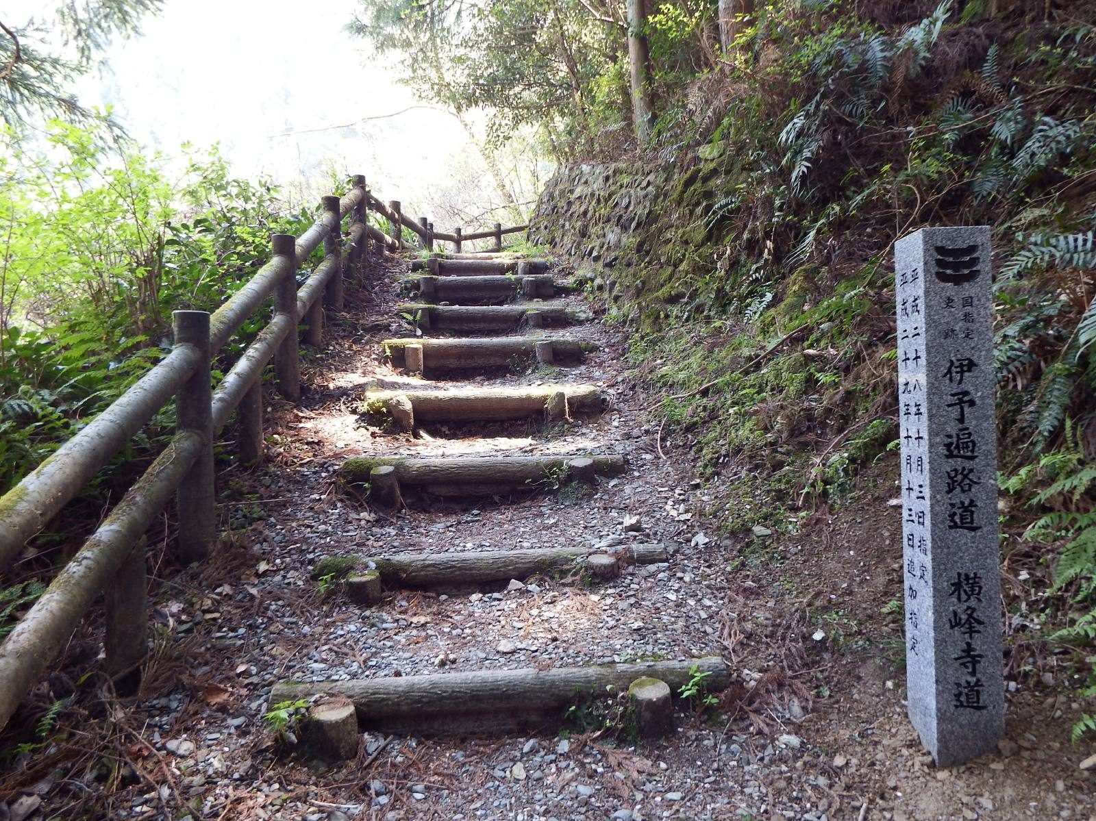 伊予遍路道 横峰寺道